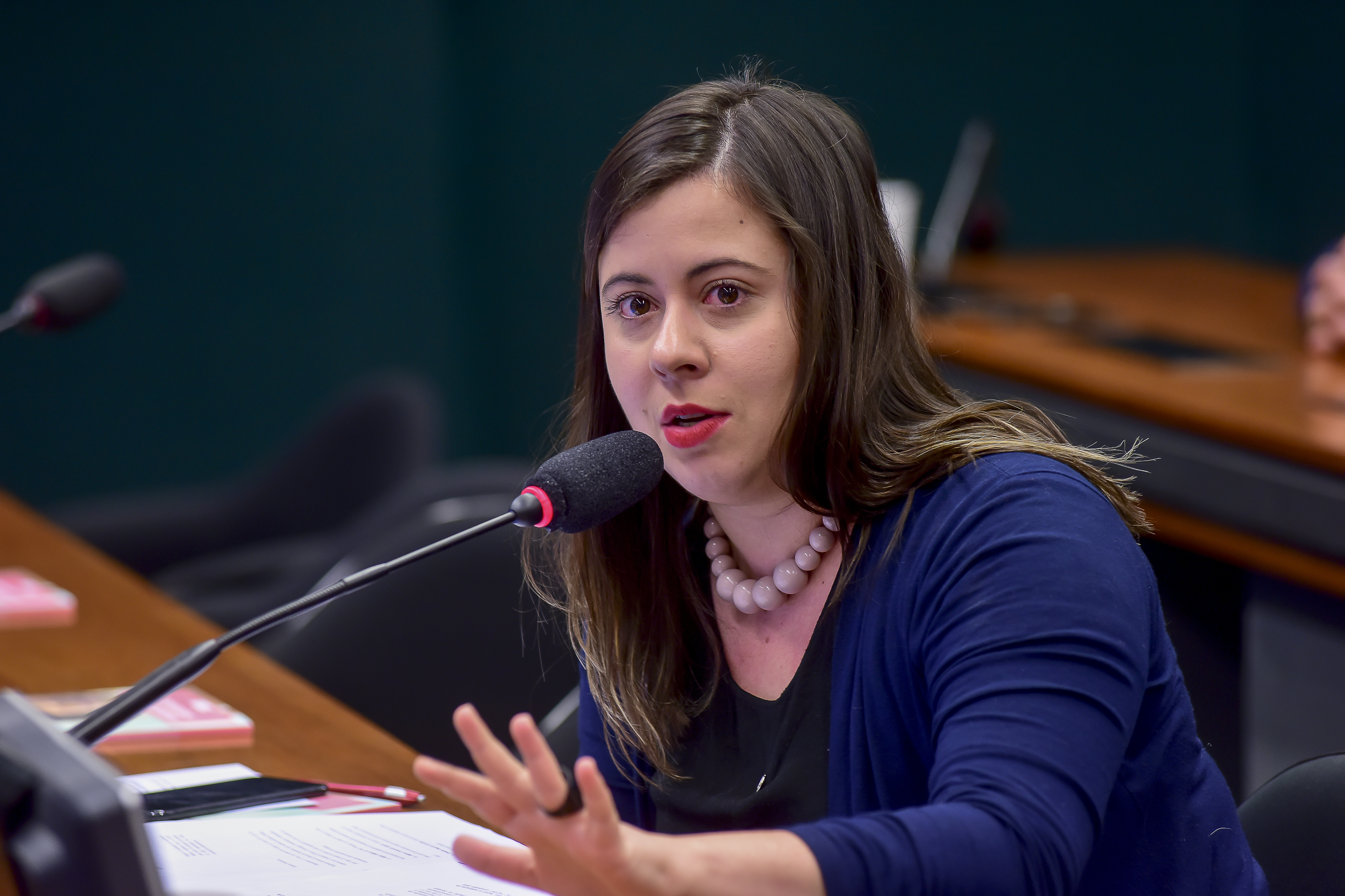 Parlamentar